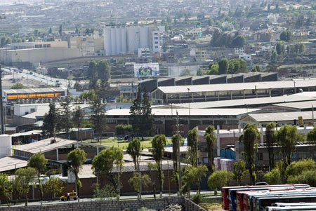 Vista Panorámica de un sector del "Parque Industrial de Arequipa"